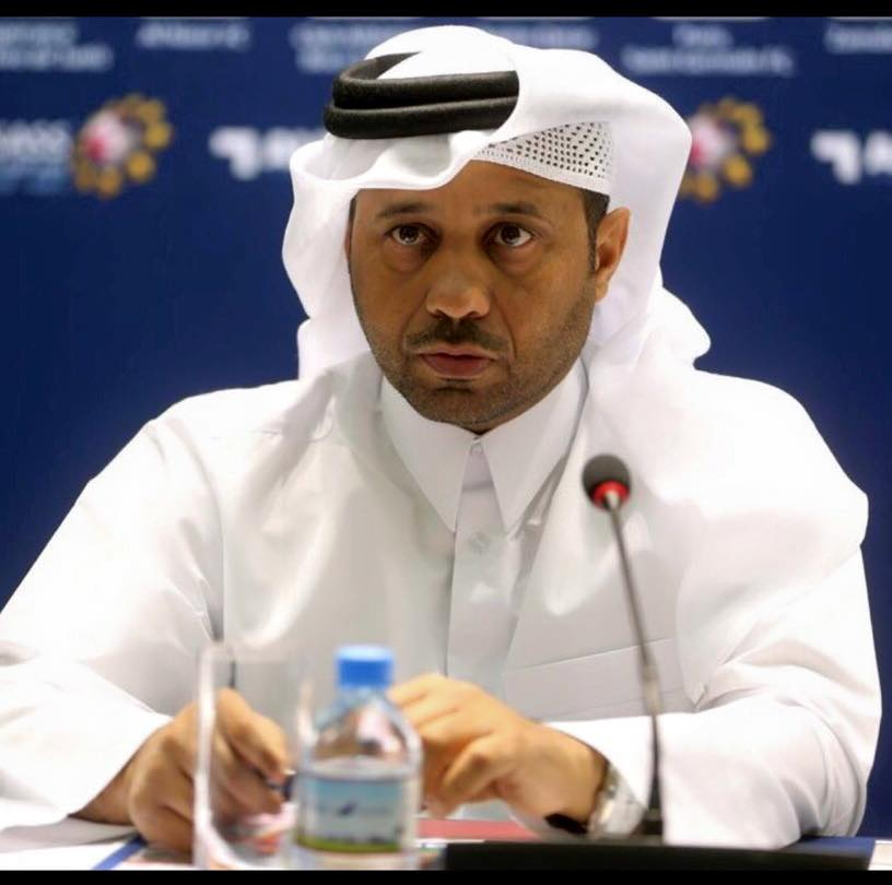 عيسى بن عبدالله الهتمي - المدير العام لقنوات الكاس الرياضية